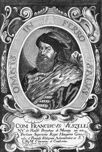 Wesselényi Ferenc (1605–1667) nádor portréja. Johann Cromer metszete